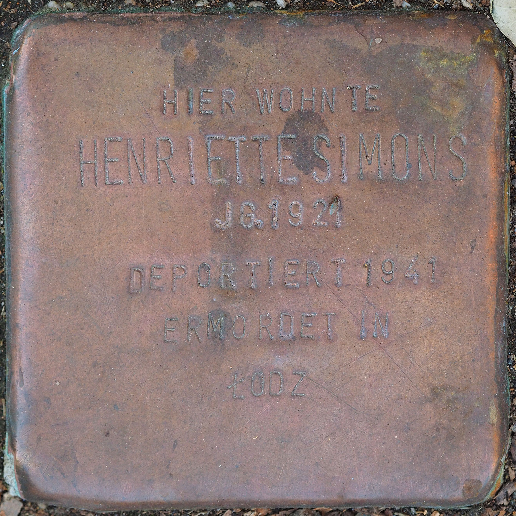 Stolperstein VIE: Simons, Henriette